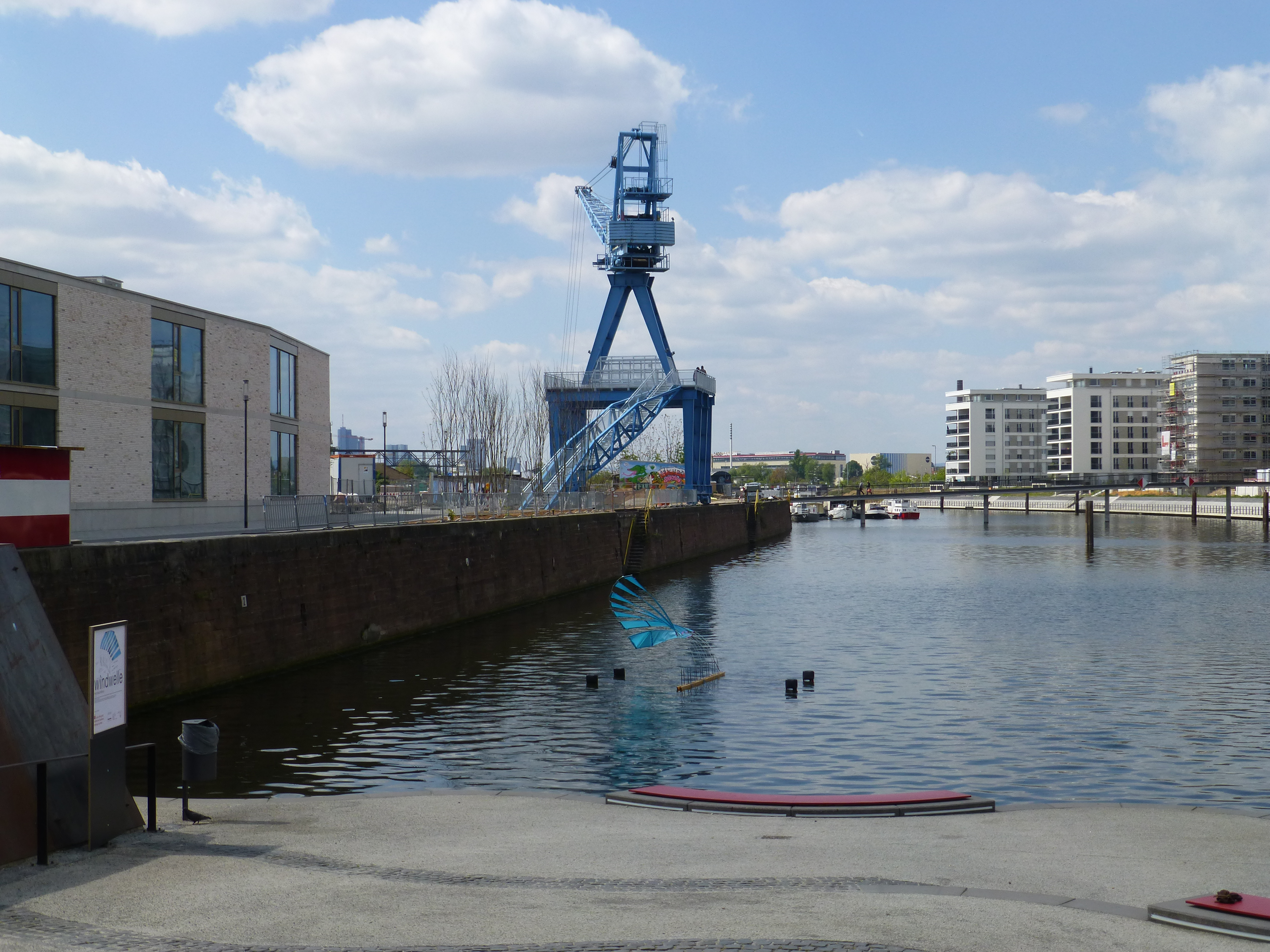 Blauer Kran (April 2017); Blick von der Hafentreppe nach Westen